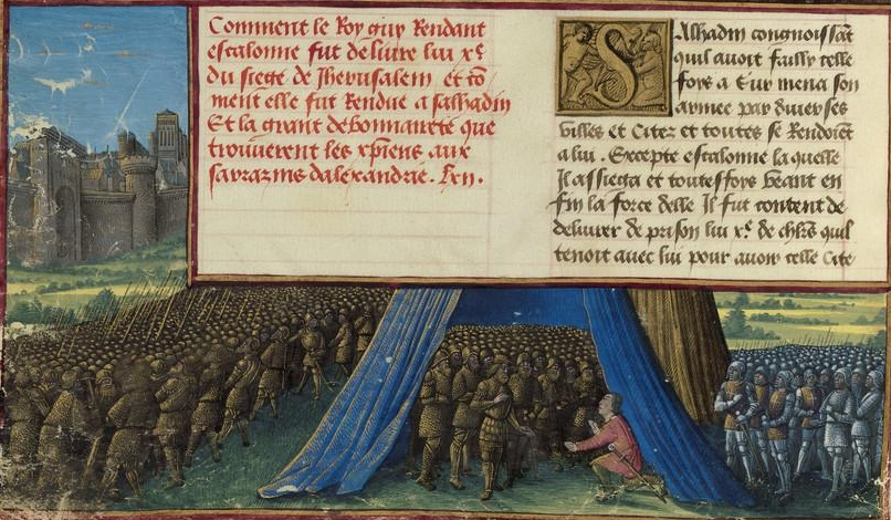 Miniature: Saladin et Balian II d'Ibelin